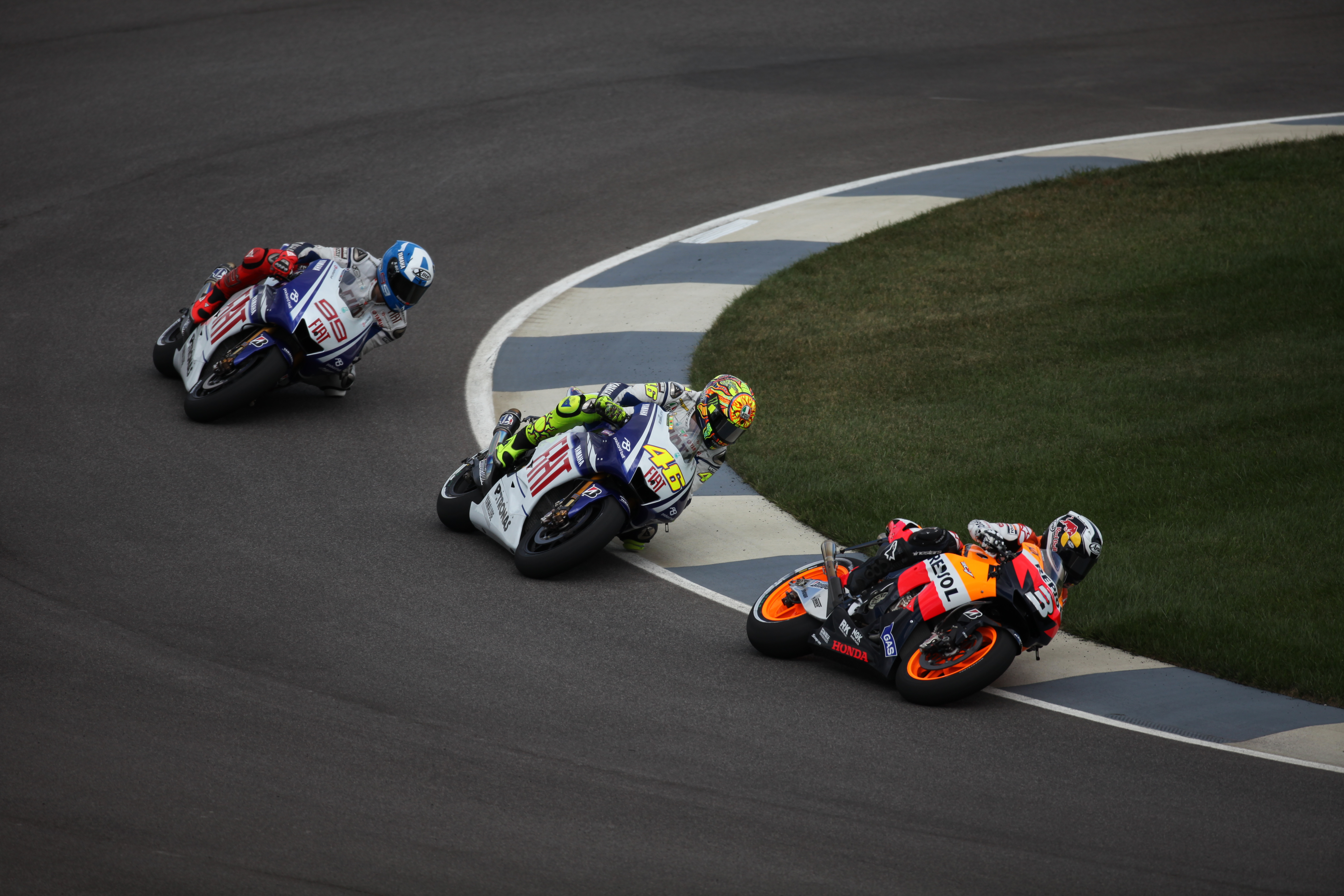 Pedrosa being chased